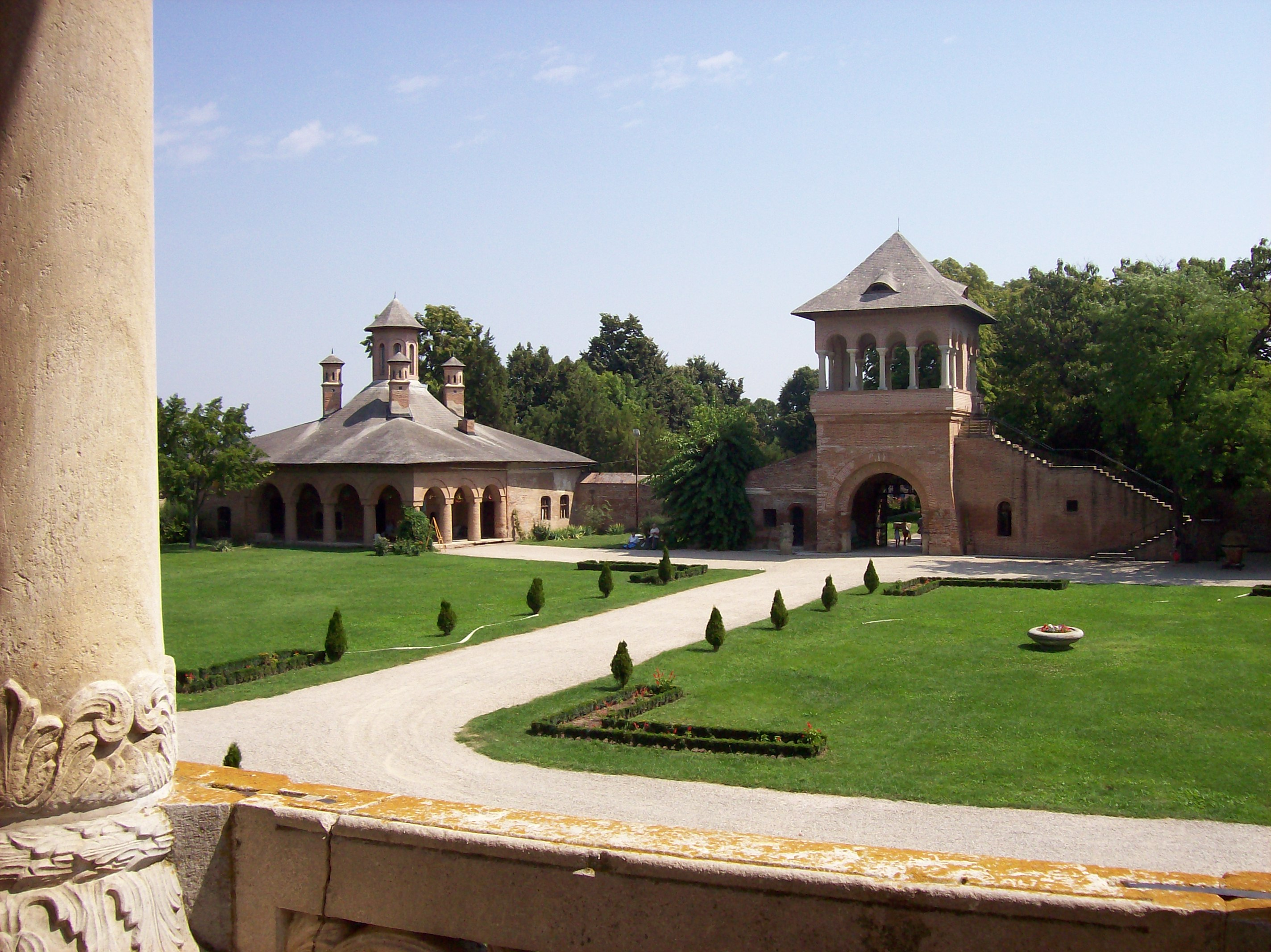 Mogosoaiapaleis, zomer 2006 01